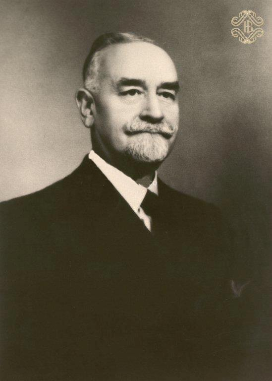 Ritratto di Niccolò Introna